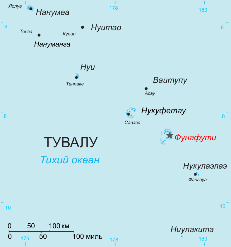 Map of Tuvalu in Russian